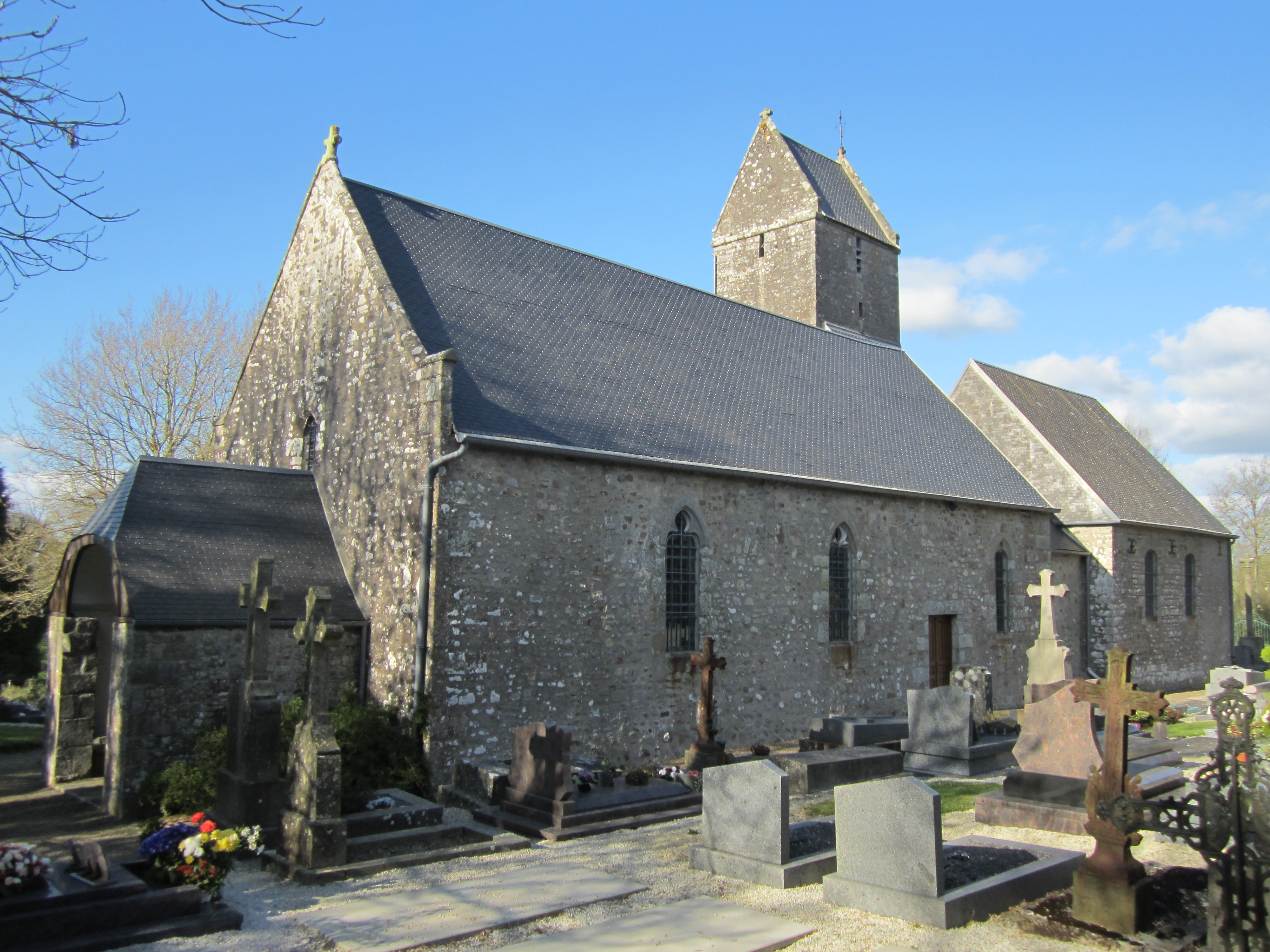 Saultchevreuil-du-Tronchet, Villedieu-les-Poeles, Manche